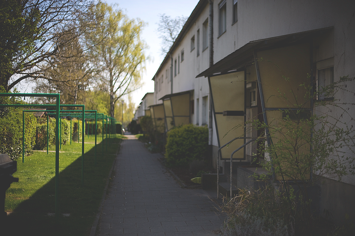 Typische Architektur der Siedlung in Frankfurt/Westhausen, mit seinen markanten, unter Denkmalschutz stehenden Reihenhäusern.